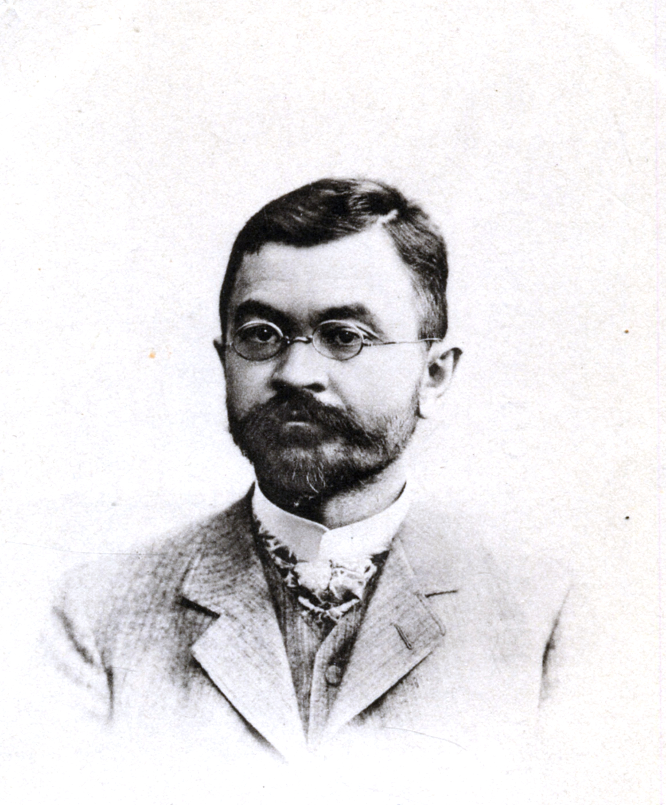 Гредескул, Николай Андреевич